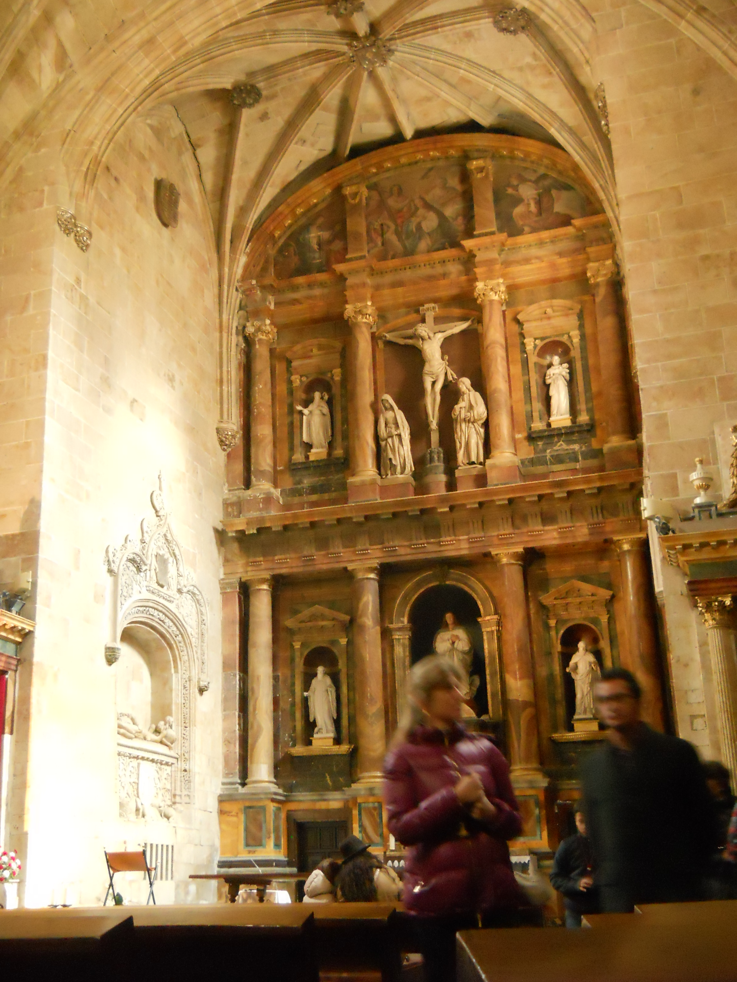 Pala d'altare della chiesa di San Benedetto, Salamanca, Spagna